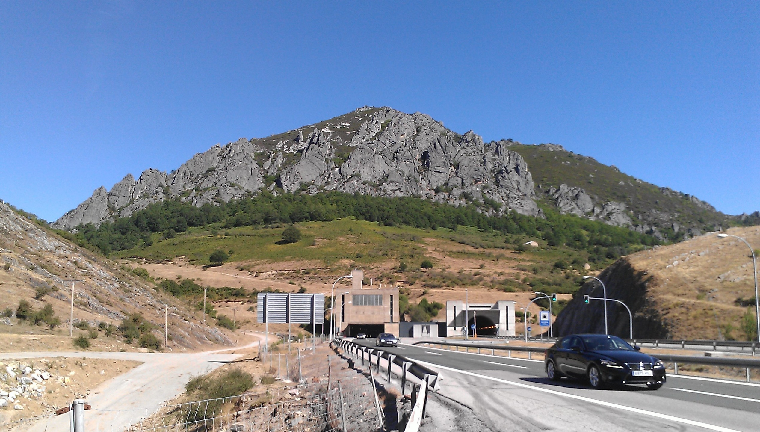 Entrada al túnel del Negrón desde el lado de Sena de Luna, provincia de León, Comunidad de Castilla y León (España). Autopista de peaje AP-66